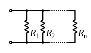 موازی